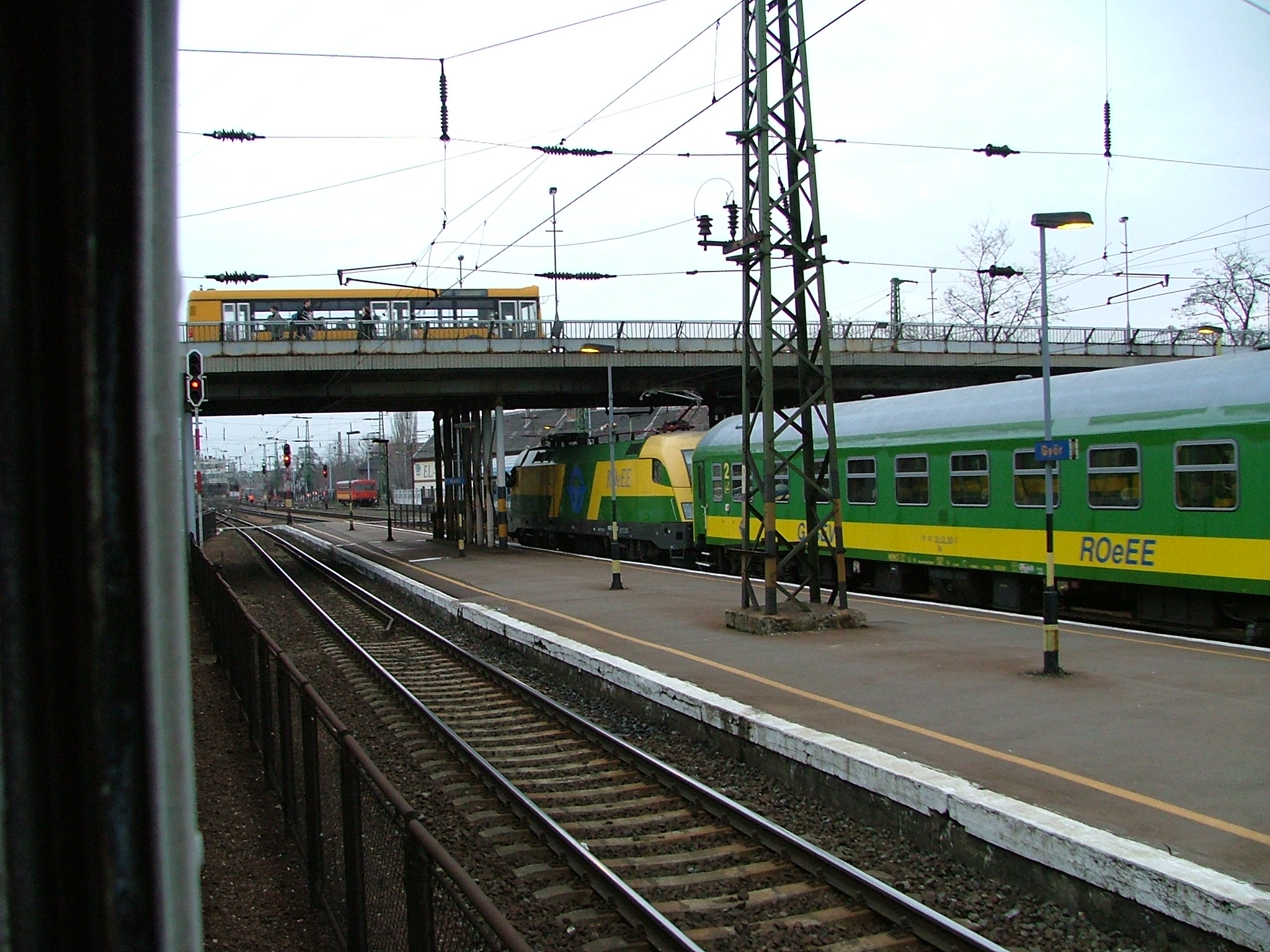 Győr, a vasútállomás fölötti Baross-híd